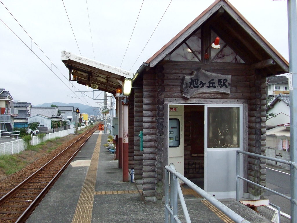 旭ヶ丘駅舎とホーム（2007年10月8日撮影）